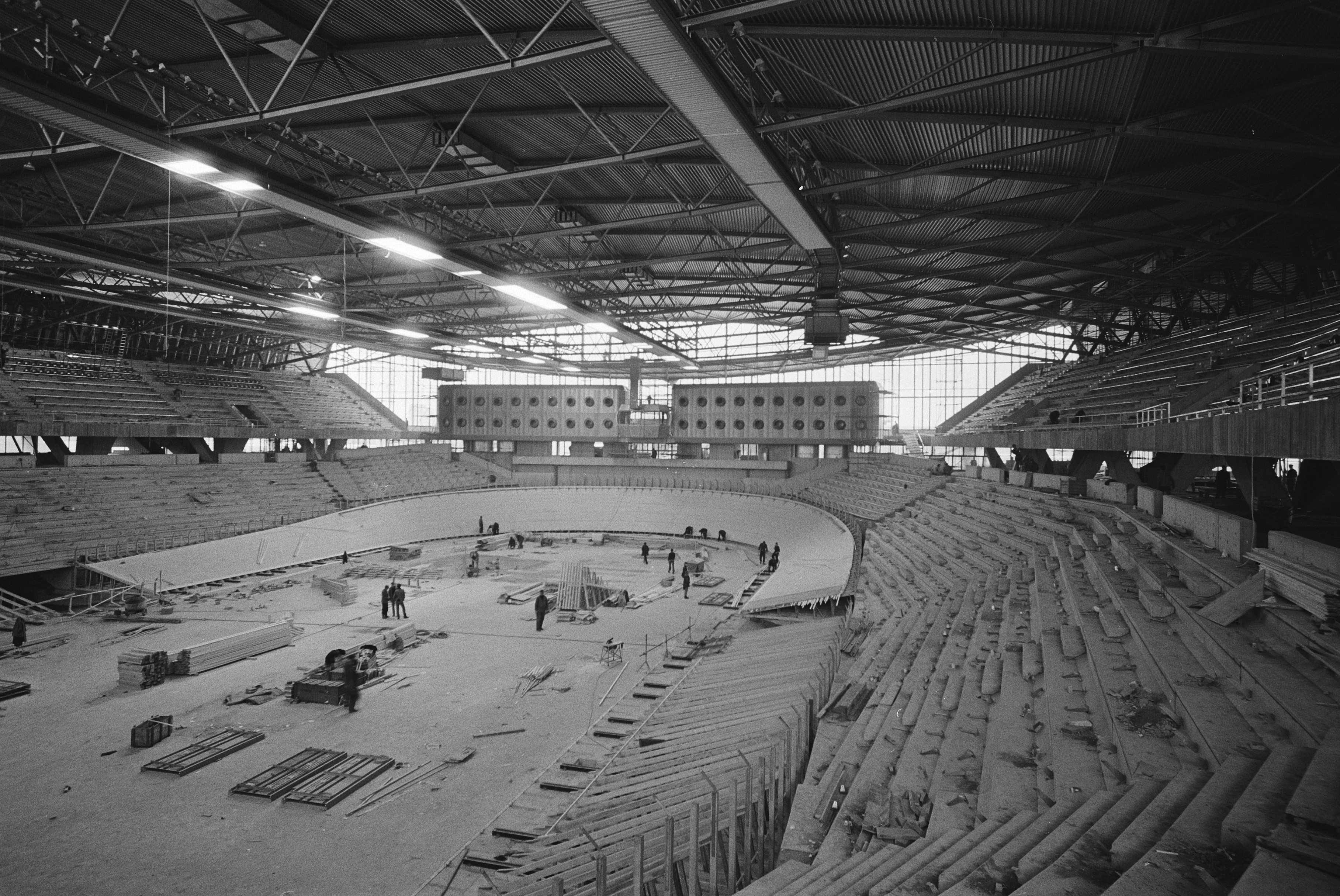 Collectie / Archief : Fotocollectie Anefo Reportage / Serie : [ onbekend ] Beschrijving : Nieuwe sportententoonstellingscomplex Ahoy in Rotterdam-Z bijna gereed; interieur overzicht Datum : 9 december 1970 Trefwoorden : complexen Instellingsnaam : Ahoy Fotograaf : Behrens, Herbert / Anefo Auteursrechthebbende : Nationaal Archief Materiaalsoort : Negatief (zwart/wit) Nummer archiefinventaris : bekijk toegang 2.24.01.05 Bestanddeelnummer : 924-0794